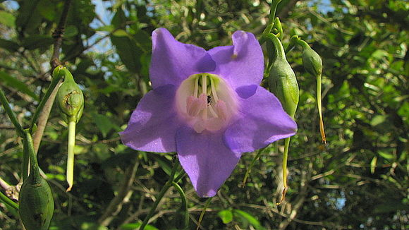 Creative Commons Attribution 3.0 (CC BY 3.0) Some rights reserved © 2008 Alex V. Popovkin View source Supplier: CalPhotos Photographer: Alex V. Popovkin Location Created: Entre Rios (Bahia, Brazil) View full-size image